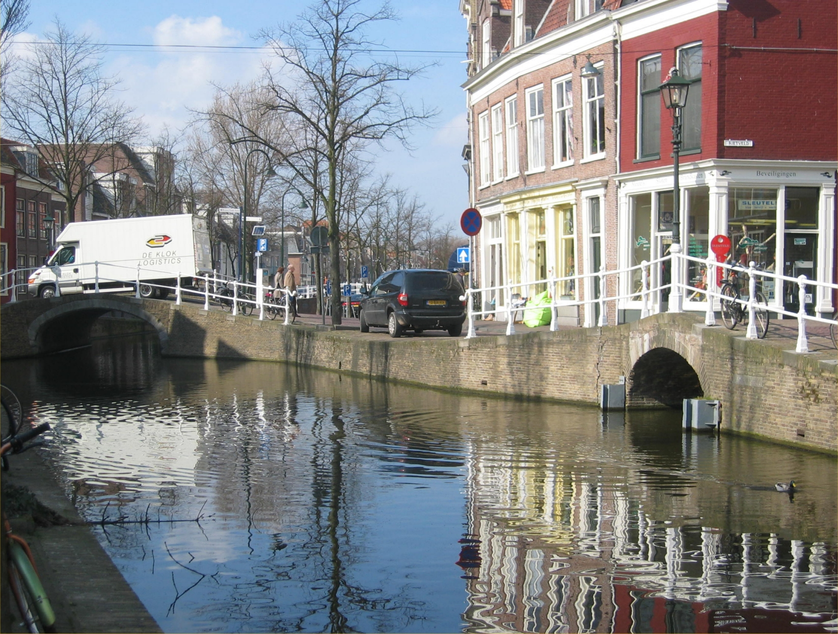 Kanal i Delft.